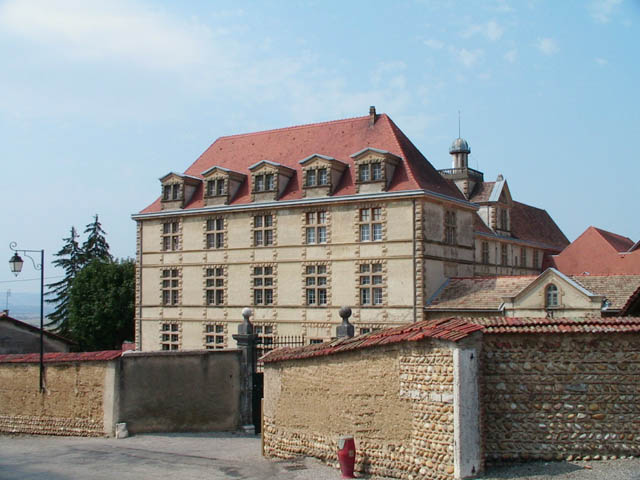 La Côte-Saint-André (38) France ; Château Louis XI